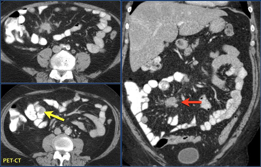 Данные МСКТ с сайта